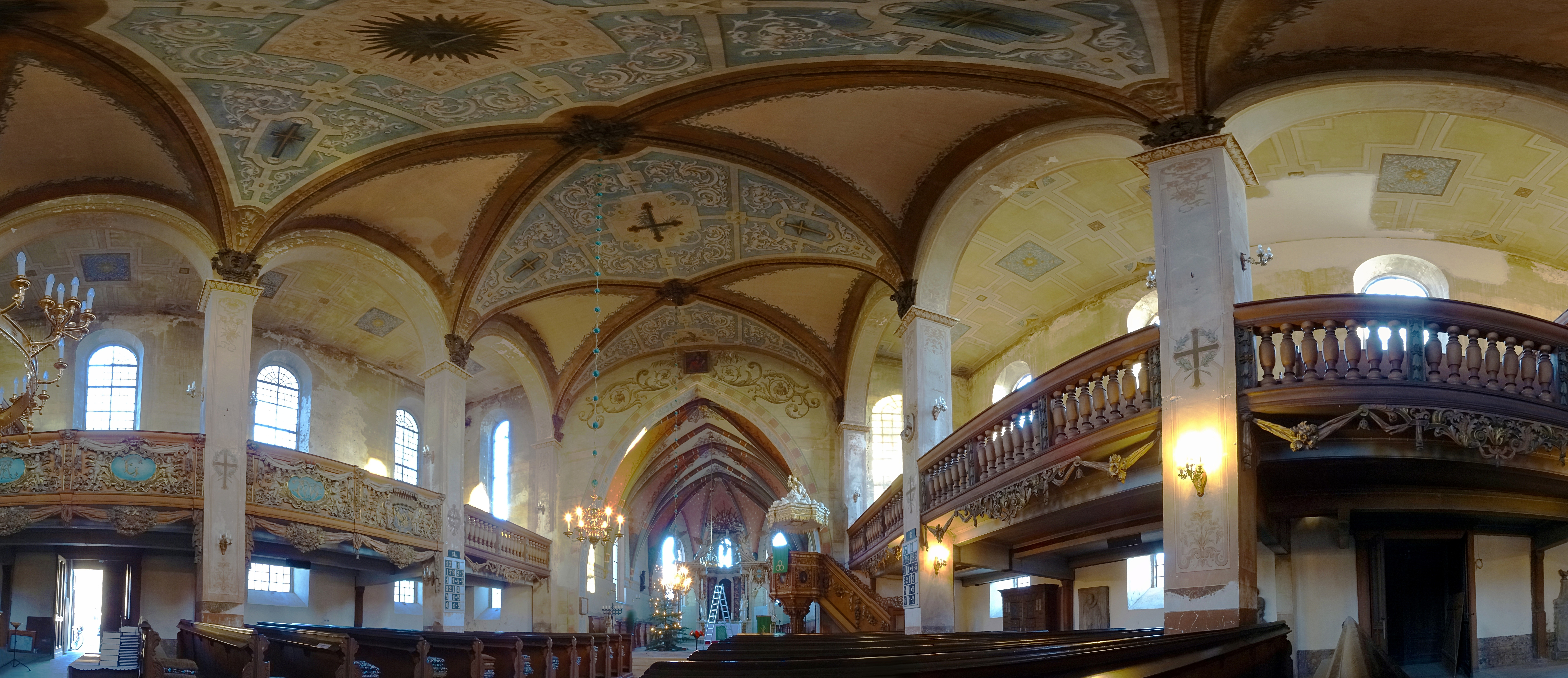 Innenraumpanorama St. Martini (Greußen) in der Fassung nach dem umfangreichen Umbau von 1894, wo sie ihren reichen Stuck und die bildhaften barocken Darstellungen verlor.